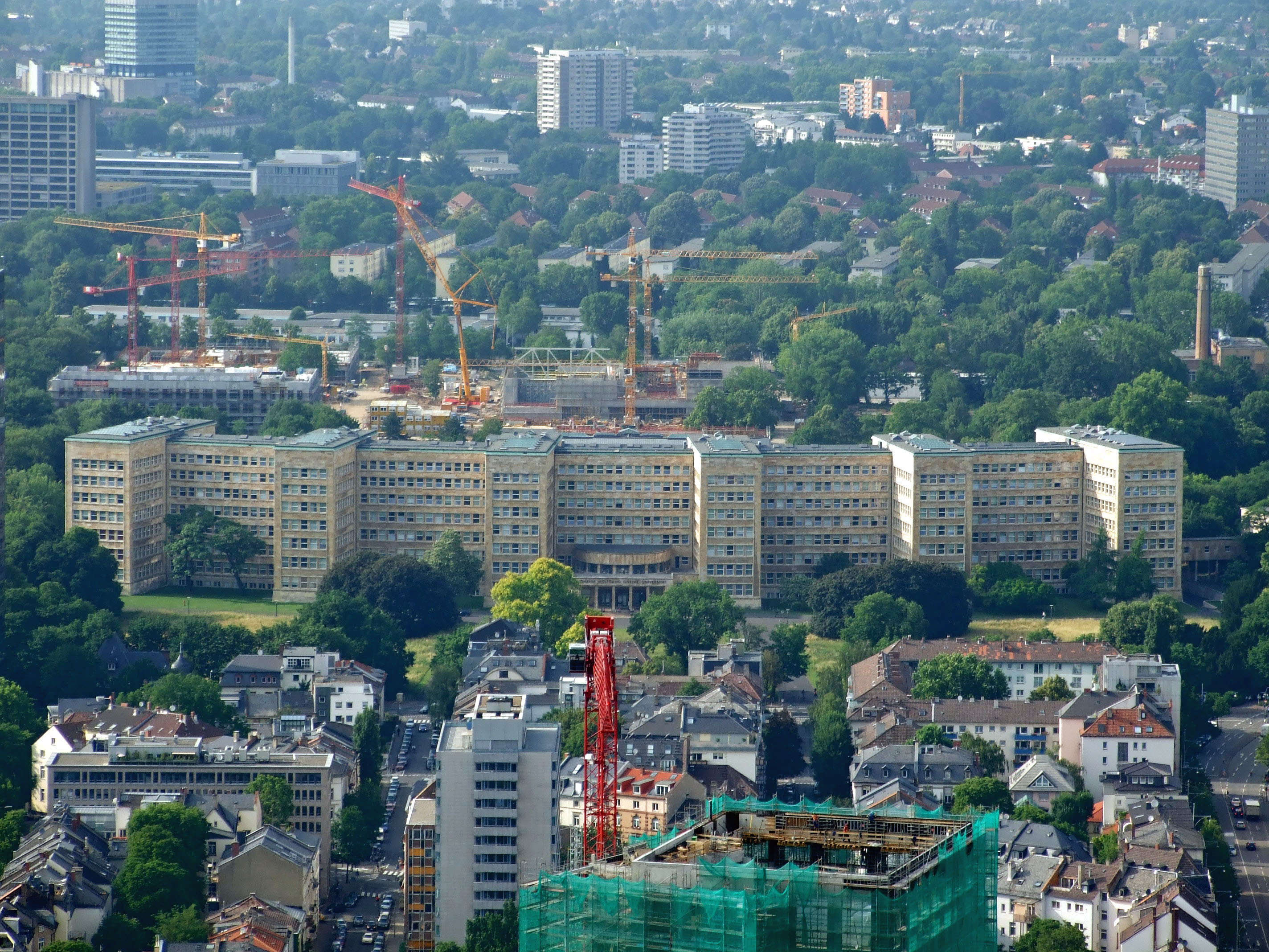 Poelzigbau, Campus Westend der Uni Ffm